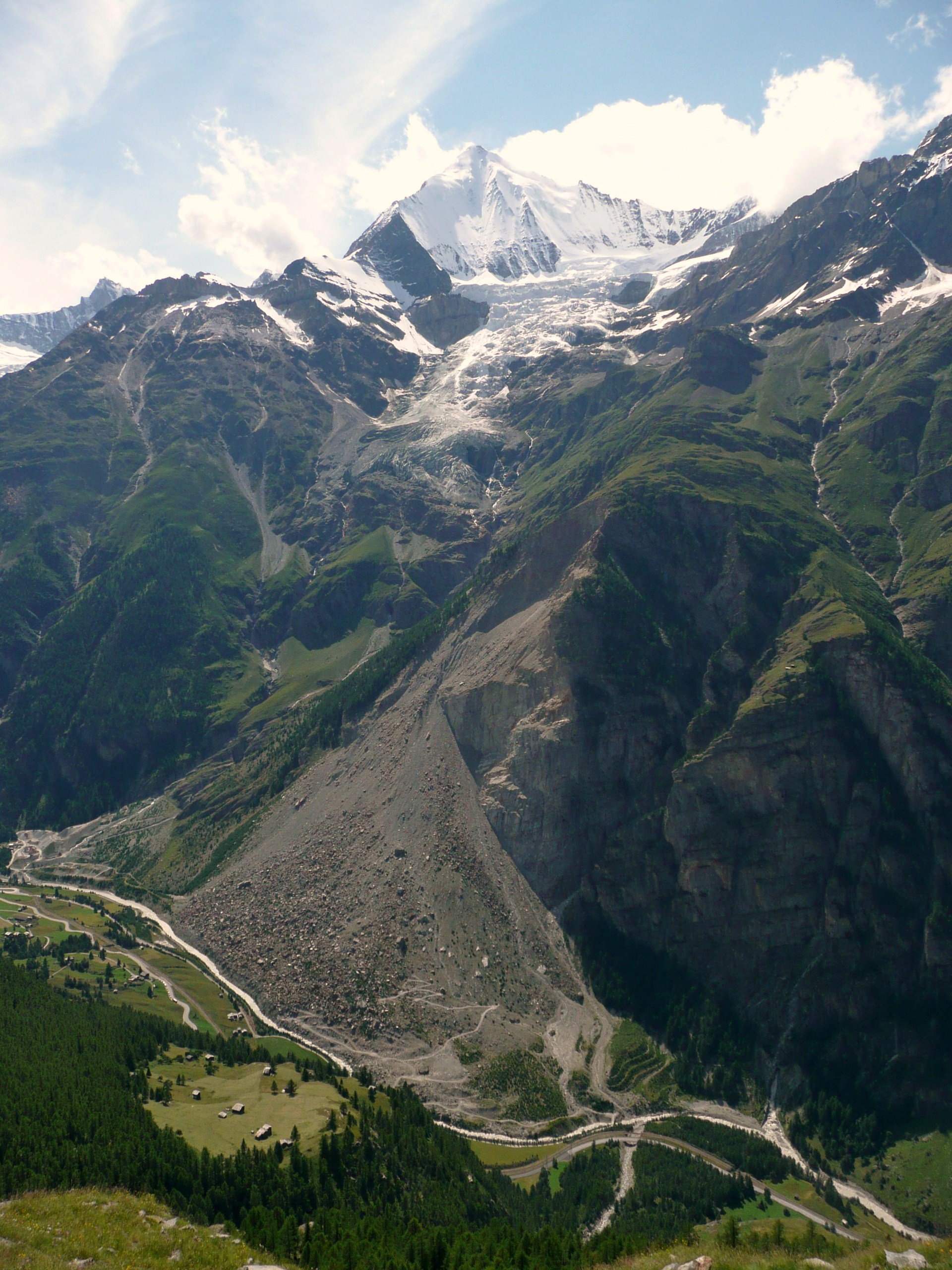 Der Bergsturz von Rande, aufgenommen vom Europaweg. Darüber das Weisshorn